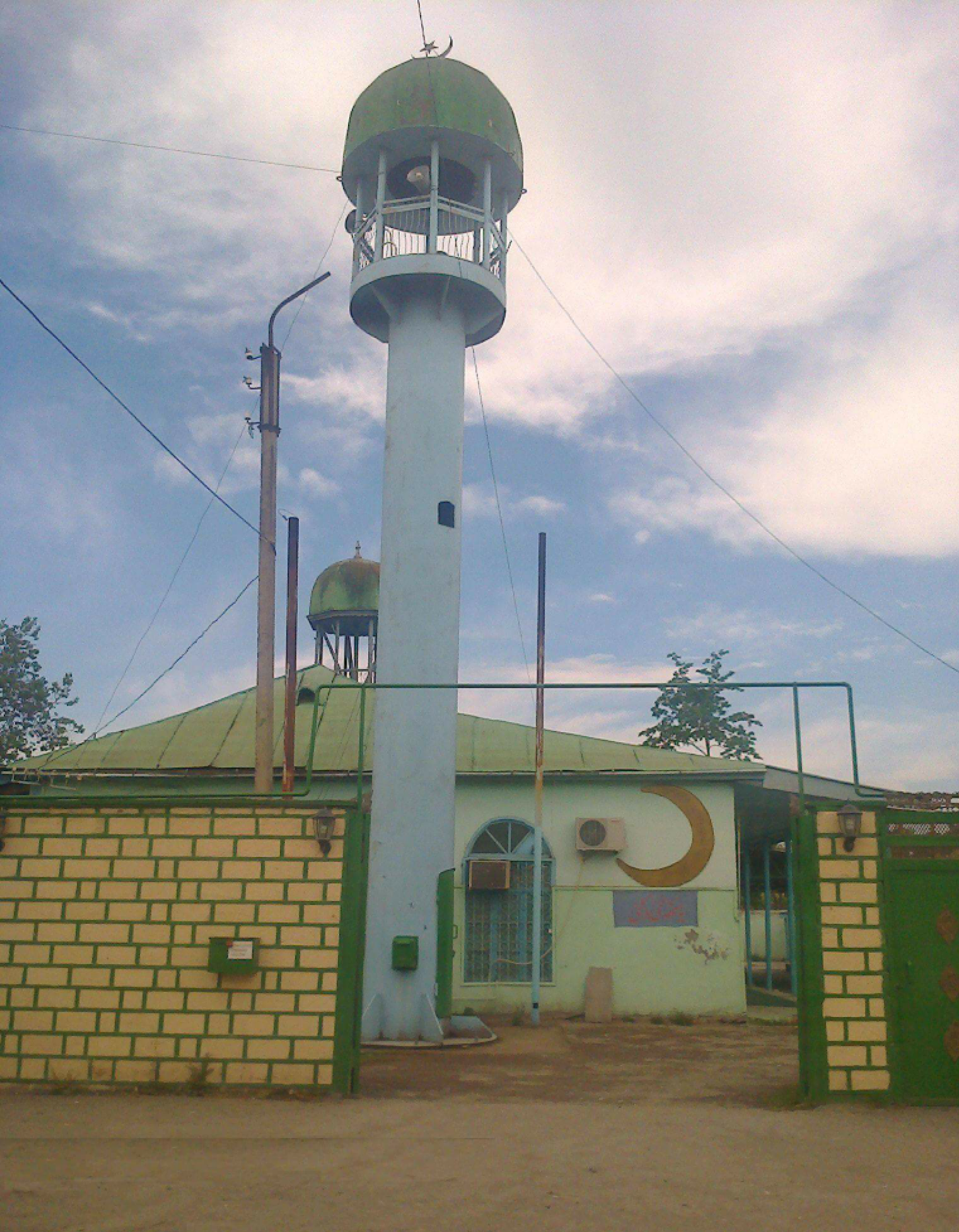 Şamaxı məscidi.